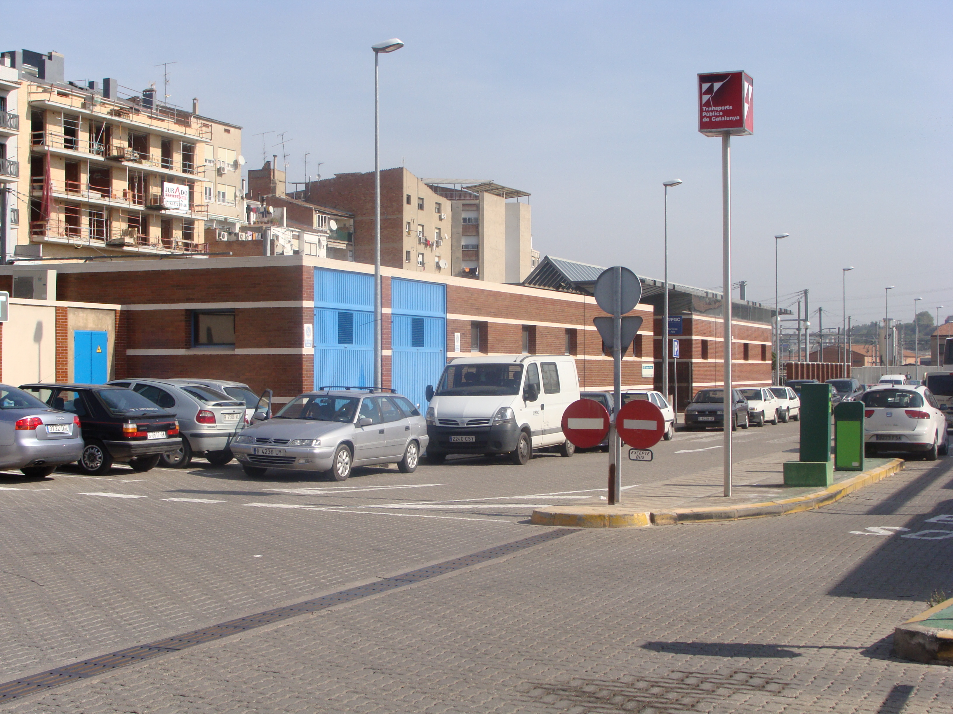 Imatge exterior de l'edifici de l'estació de Manresa-Alta dels FGC.